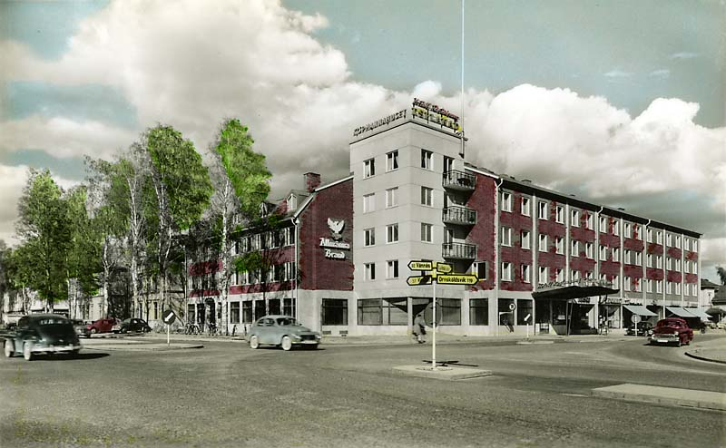 Hotell Esplanad. Handkolorerad variant av ac01195.; Byggnadsverk; Hotell; Rekreation och turism